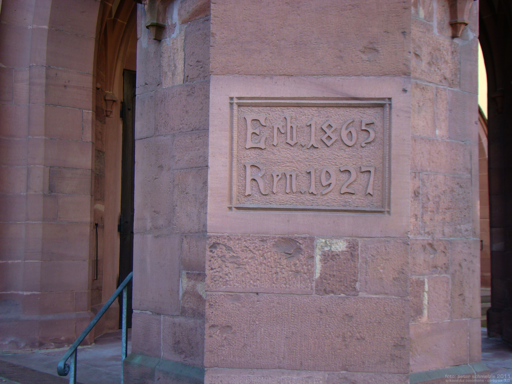 Datierungen an der Vorhalle der Pfarrkirche Unserer lieben Frau in Waibstadt